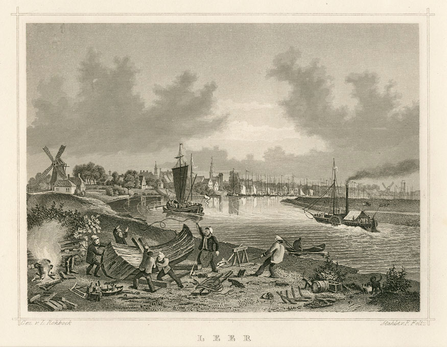 “Leer”. Ansicht über die Ems. Im Vordergrund Schiffsbauer. Stahlstich von F. Foltz nach Ludwig Rohbock, um 1850. Darstellung : 12 × 16,4 cm, Blattgröße : 21 × 27 cm